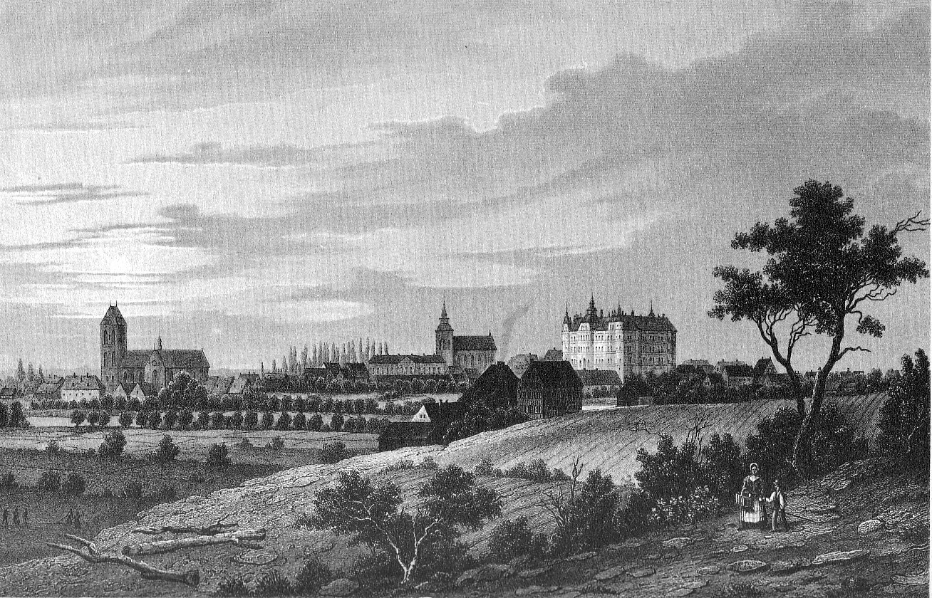 Historische Ansicht von Güstrow in Mecklenburg-Vorpommern. Stahlstich.